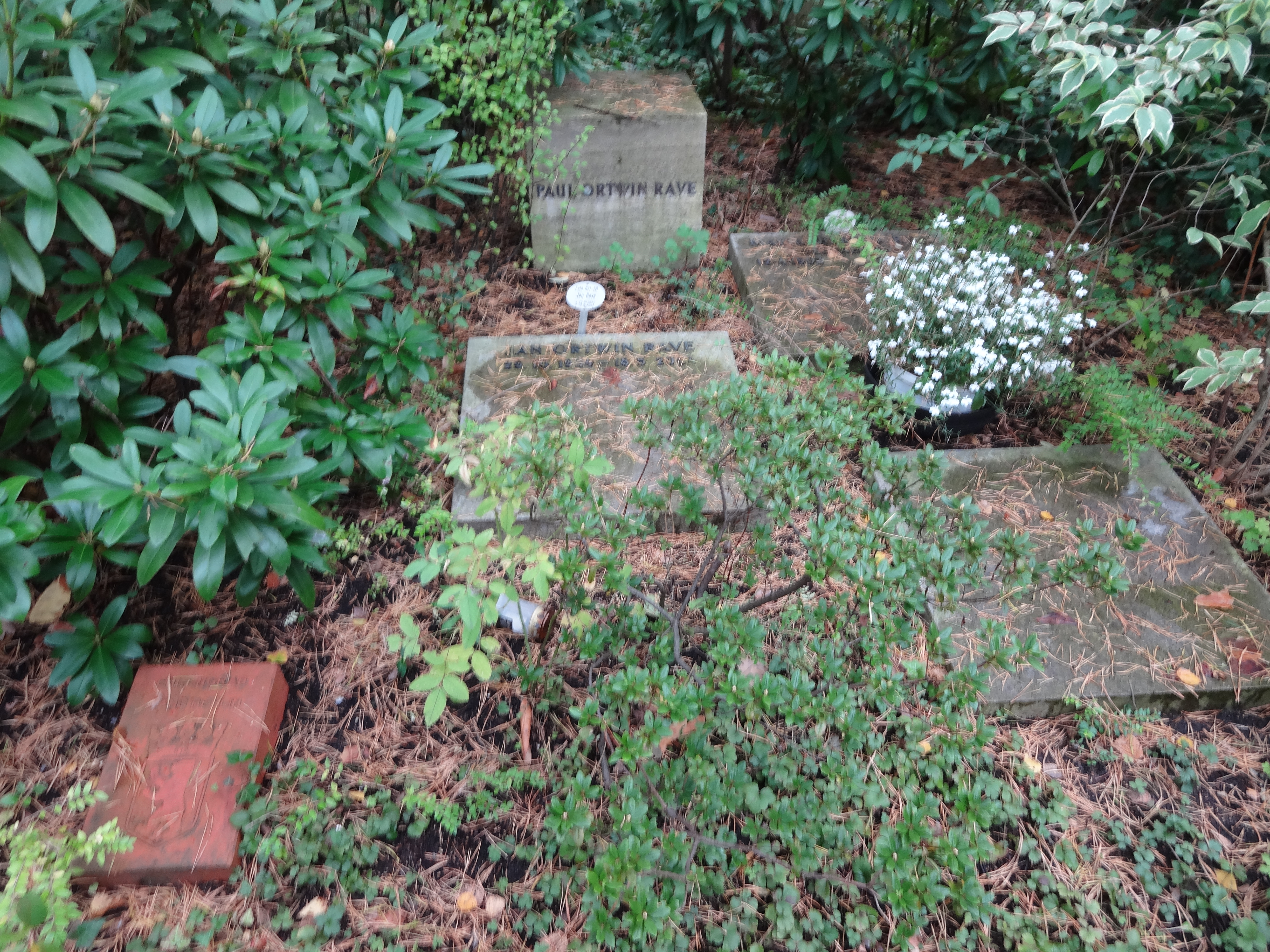 Grab von Paul Ortwin Rave auf dem Waldfriedhof Zehlendorf, ehemaliges Ehrengrab